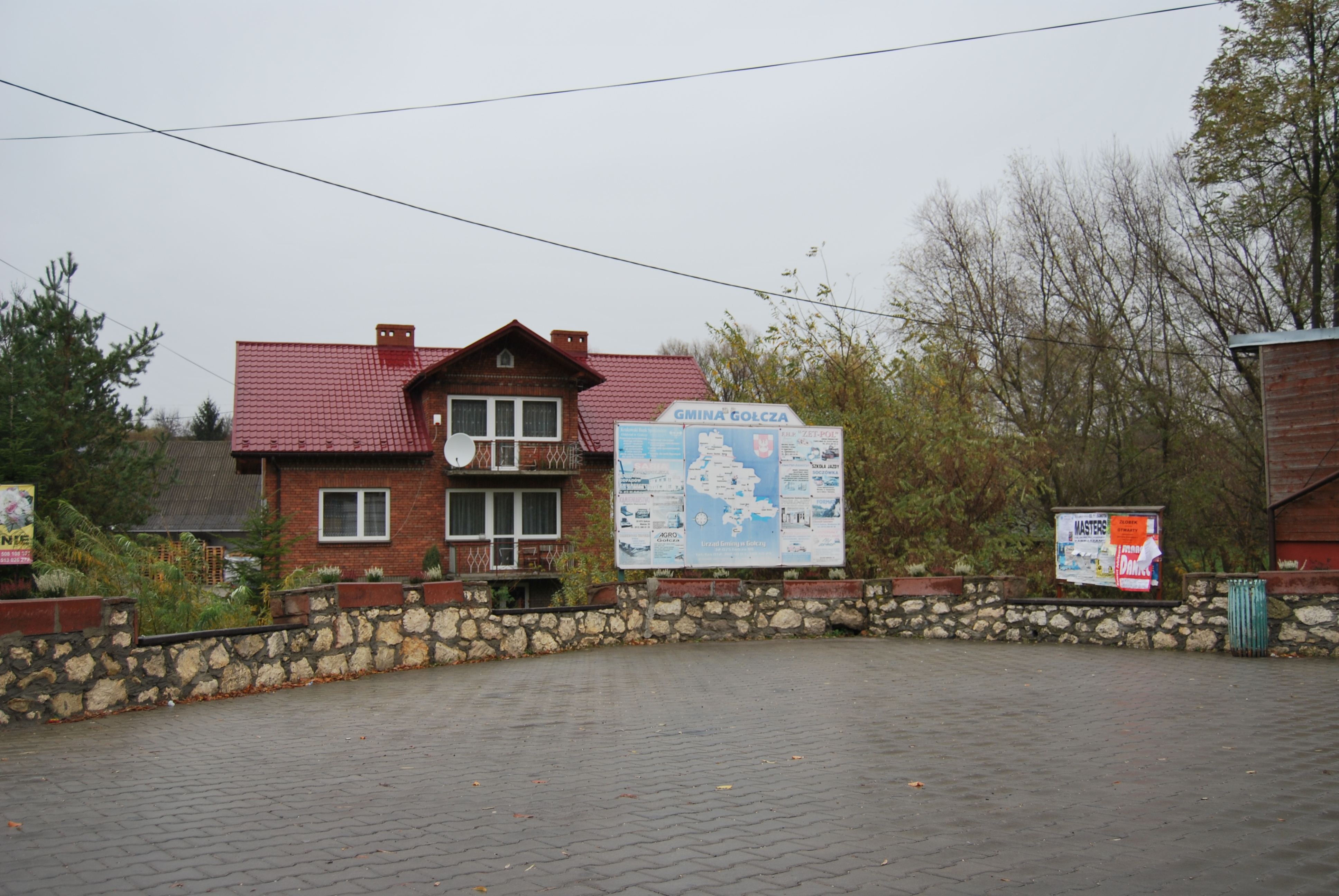 Gołcza, centrum wsi (2012).